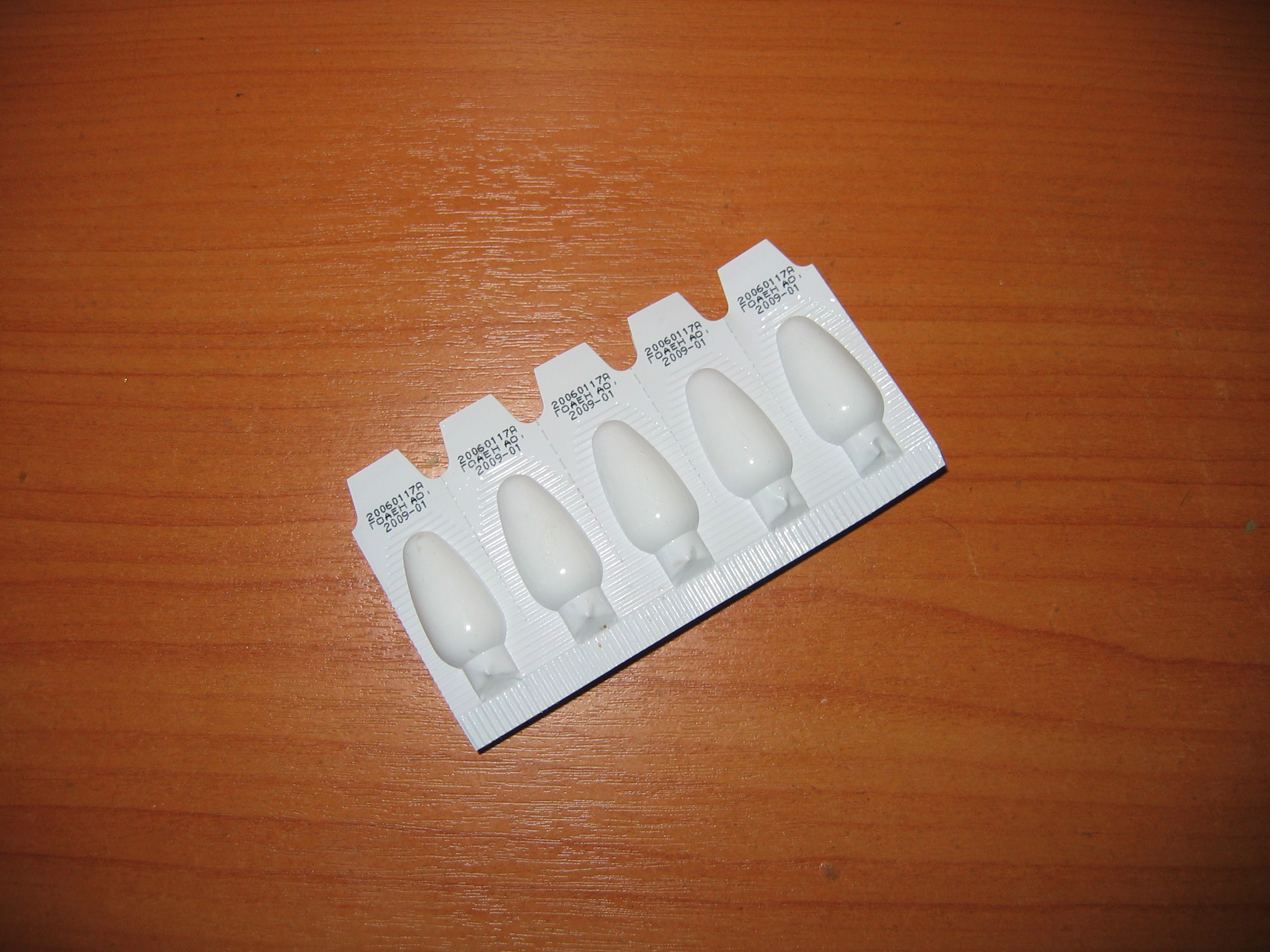 Suppository